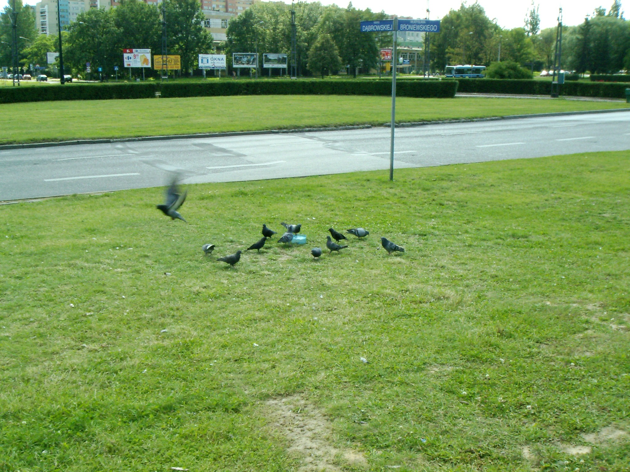 Pojnik dla ptaków na trawniku obok ronda gen. Maczka w Krakowie